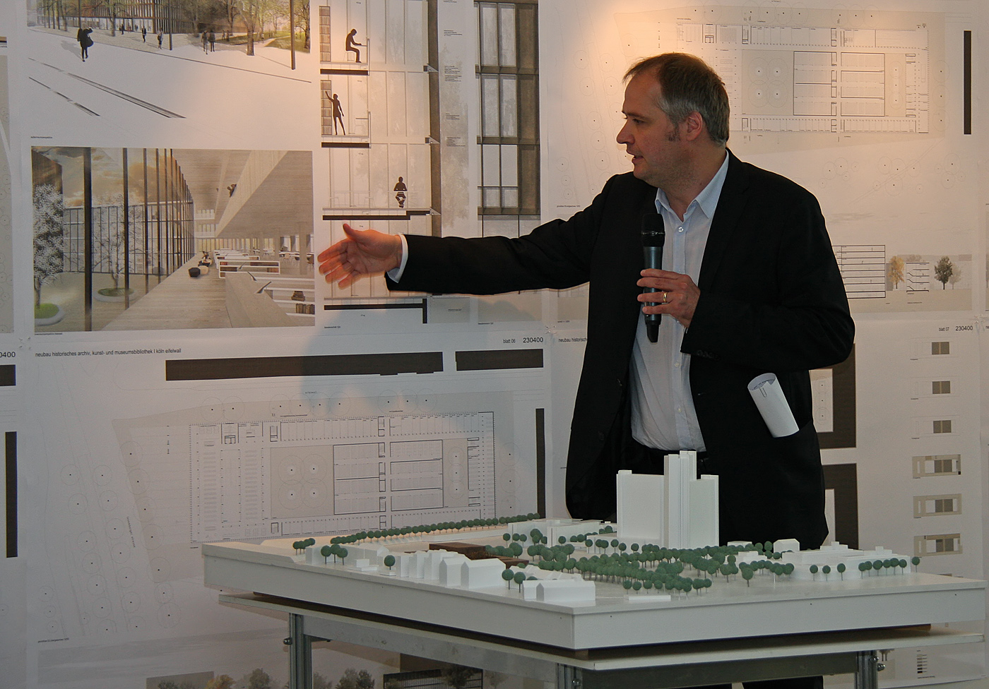 Ausstellungseröffnung der Entwürfe des Architektenwettbewebs zum Neubau des zerstörten Historischen Archivs der Stadt Köln zusammen mit der Kunst- und Museumsbibliothek. Präsentation des Sieger-Entwurfs des Büros Waechter + Waechter Architekten Darmstadt. Architekt Felix Waechter erläutert seinen Entwurf.